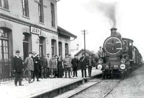 Station Uden eind 19e en begin 20e eeuw aan de stationsweg, grenzend aan industrieterrein Molenheide dat aan de andere kant van de vier sporen gelegen was.